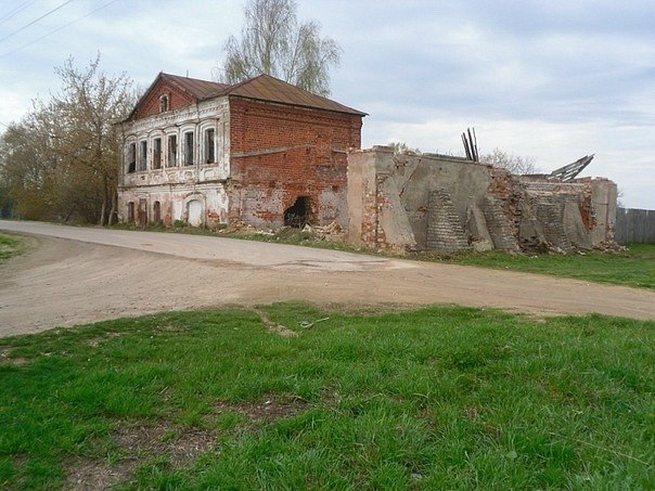 Дом купца Оранышева в селе Клин Вачского района Нижегородской области